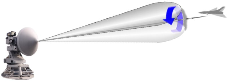 Prinzip der Minimumpeilung (Conical Scan)